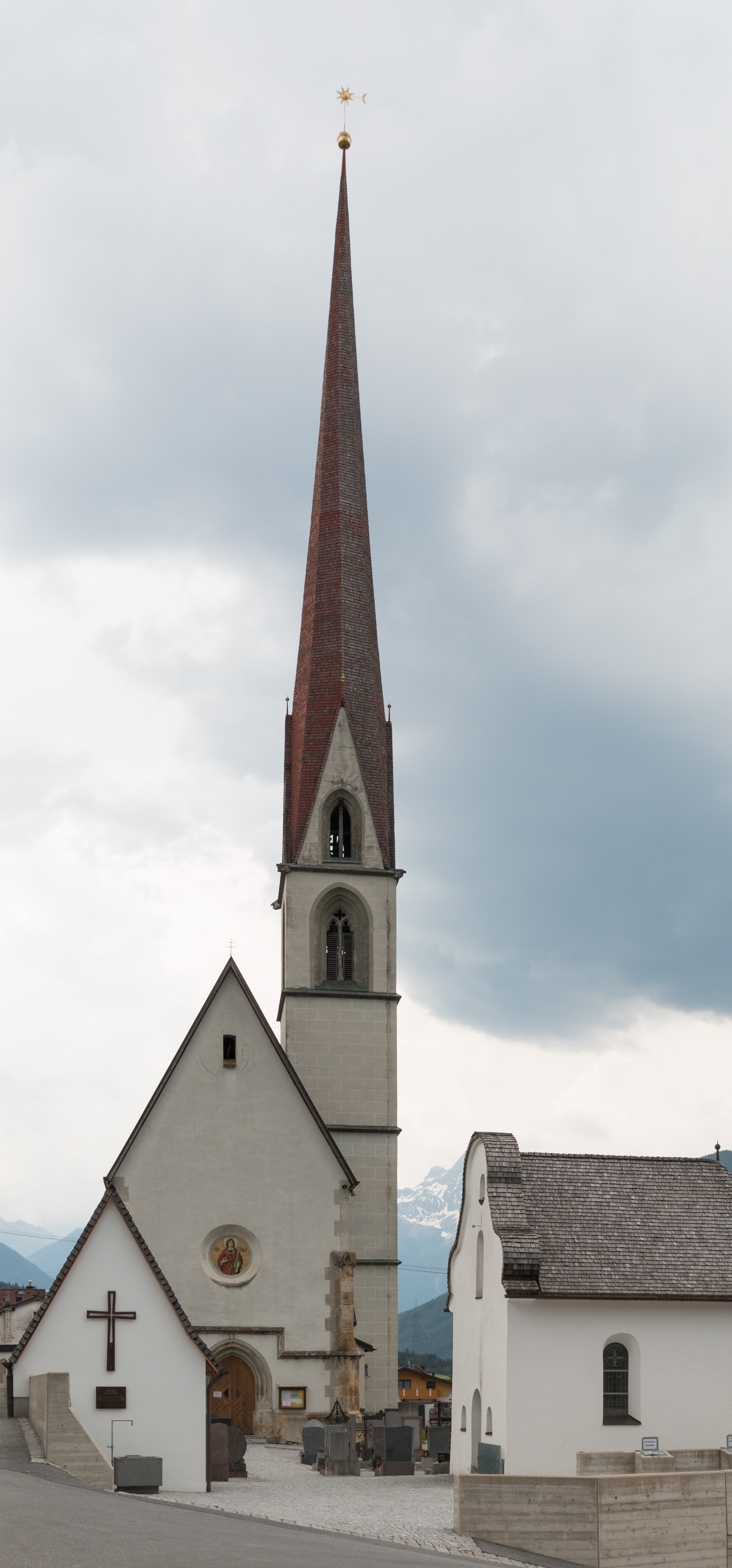 Die Kath. Pfarrkirche hl. Stephanus mit dem Kriegerdenkmal (links) und der Friedhofskapelle in Karres, Tirol, Österreich.